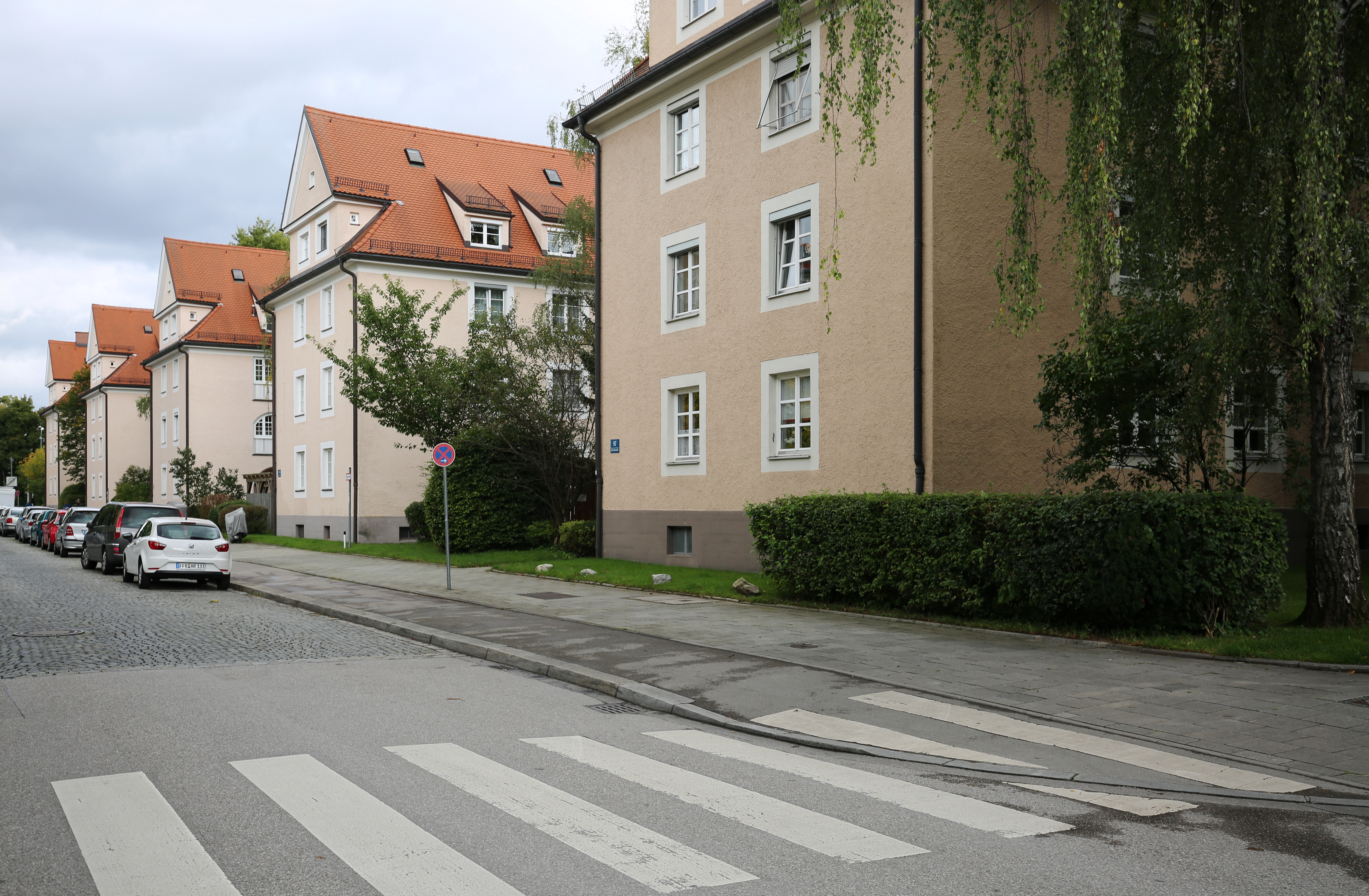 Wohnanlage Zielstattstraße, Nelkenweg in München-Obersendling. Entworfen 1918 von Stadtbaumeister Theodor Fischer. Die Anlage besteht aus fünf vierstöckigen Längsbauten in Nord-Süd-Richtung, von denen die äußeren beiden die volle Länge erreichen und die drei mittleren kürzer sind. Im Süden liegt in dem durch die kürzeren Riegel freigelassenen Raum ein Querriegel aus Reihenhäusern mit kleinen Gärten im Süden. Das Bild zeigt die Nordseite der Anlage mit den Längsriegeln.